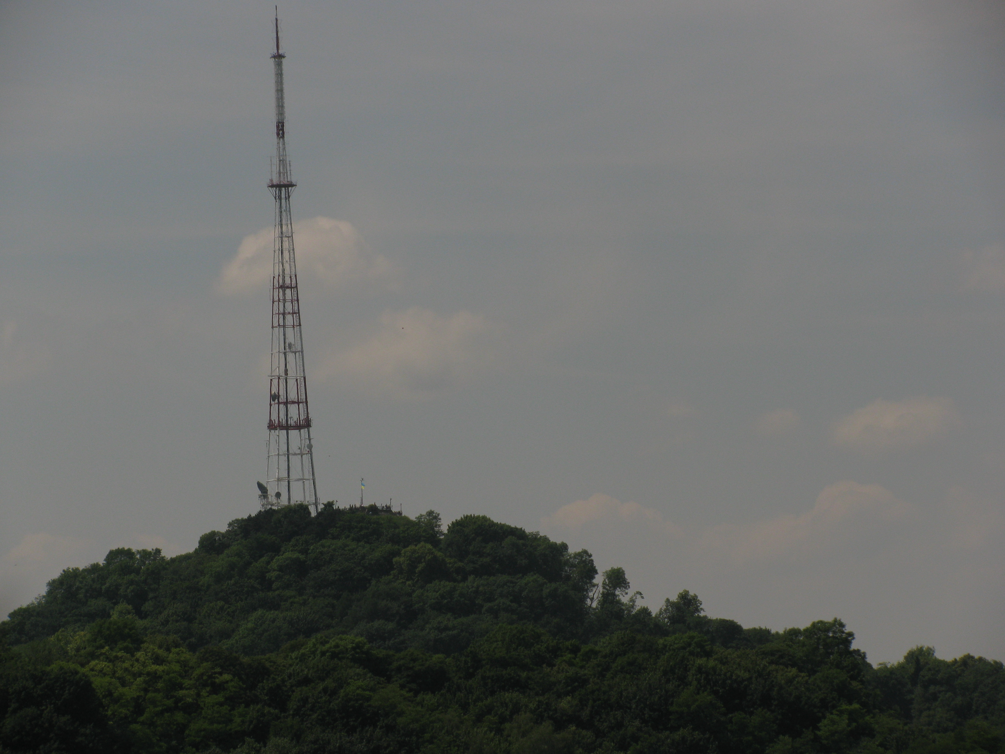 Замкова гора. Львів.